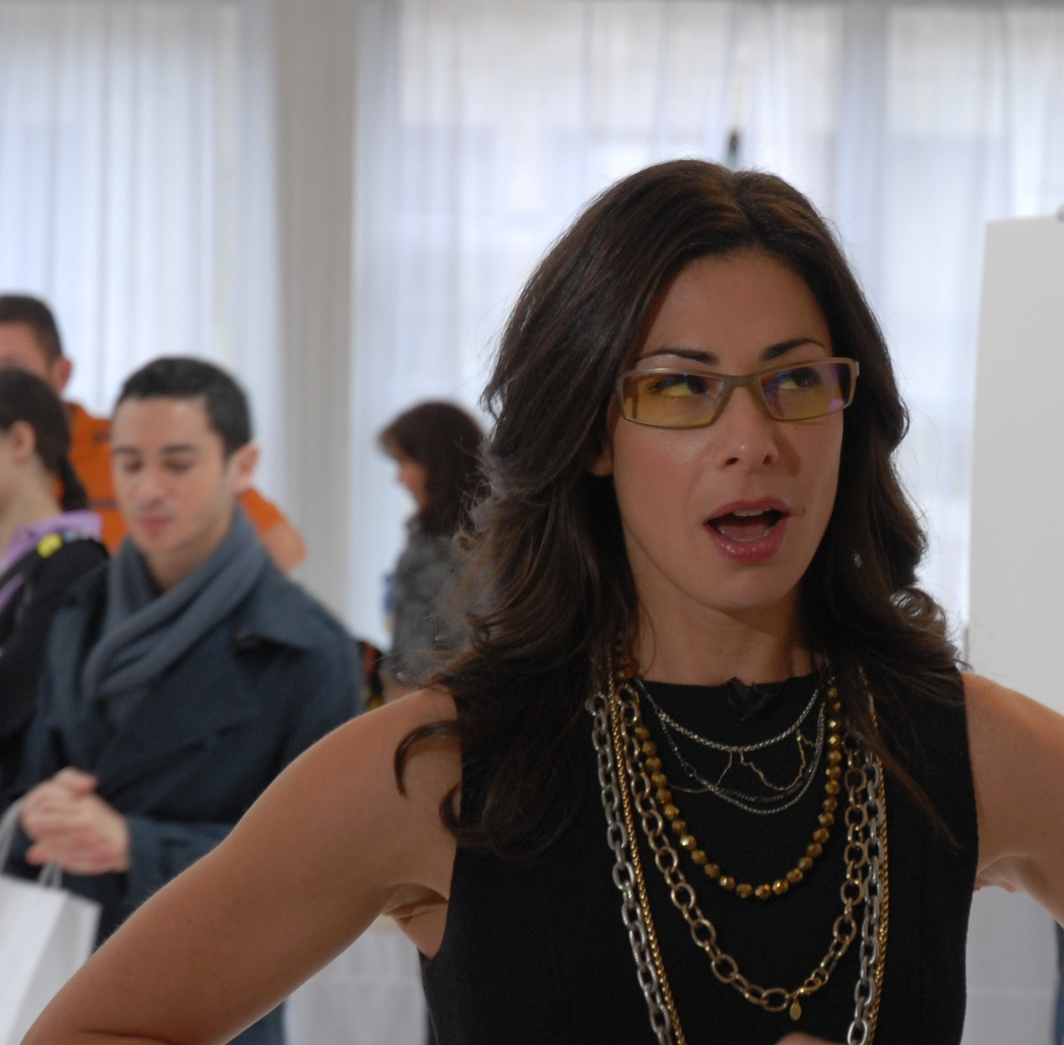 Hmmm, are you sure?